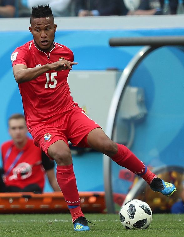 Сборная Англии сокрушила Панаму, Кейн оформил хет-трик